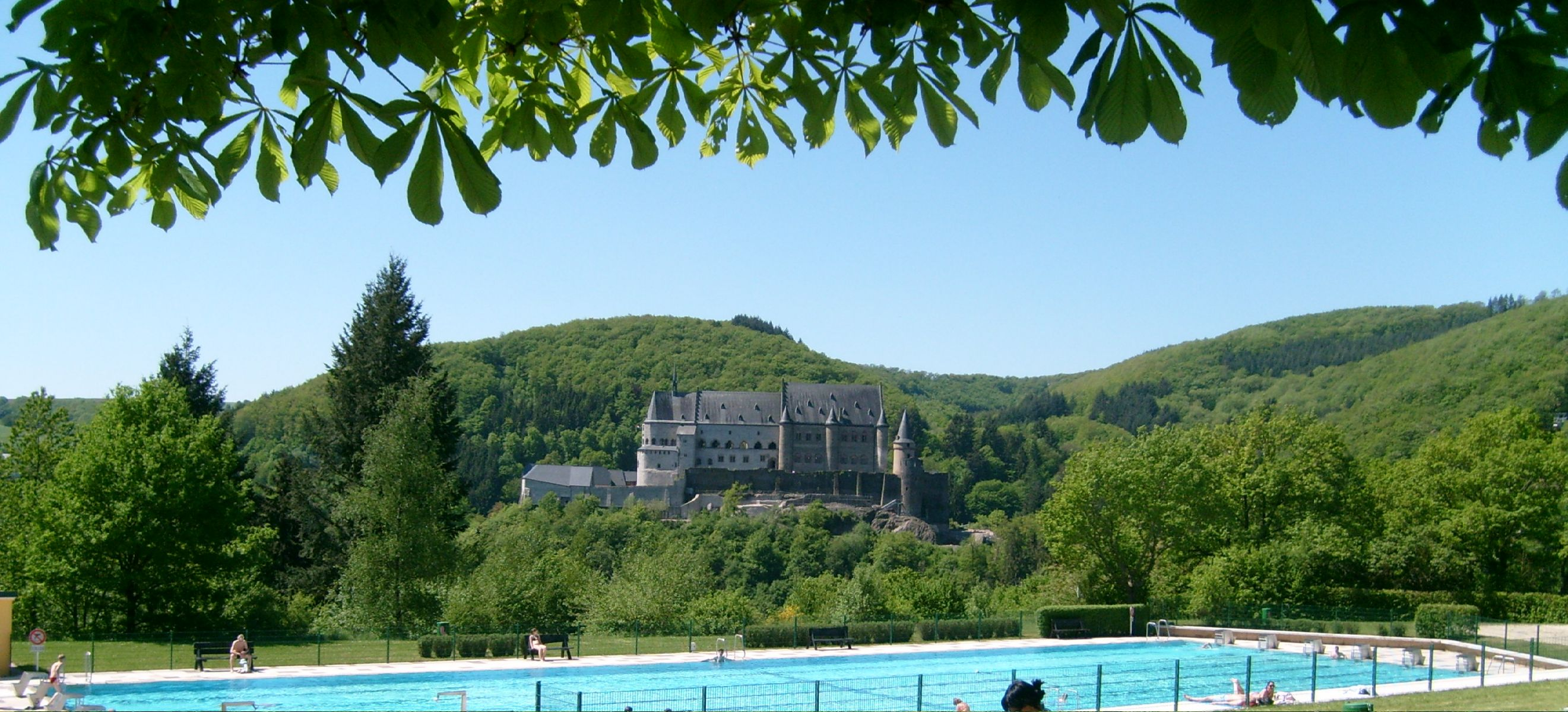 Vue vun der Veianer Schwemm op d'Buerg Veianen.